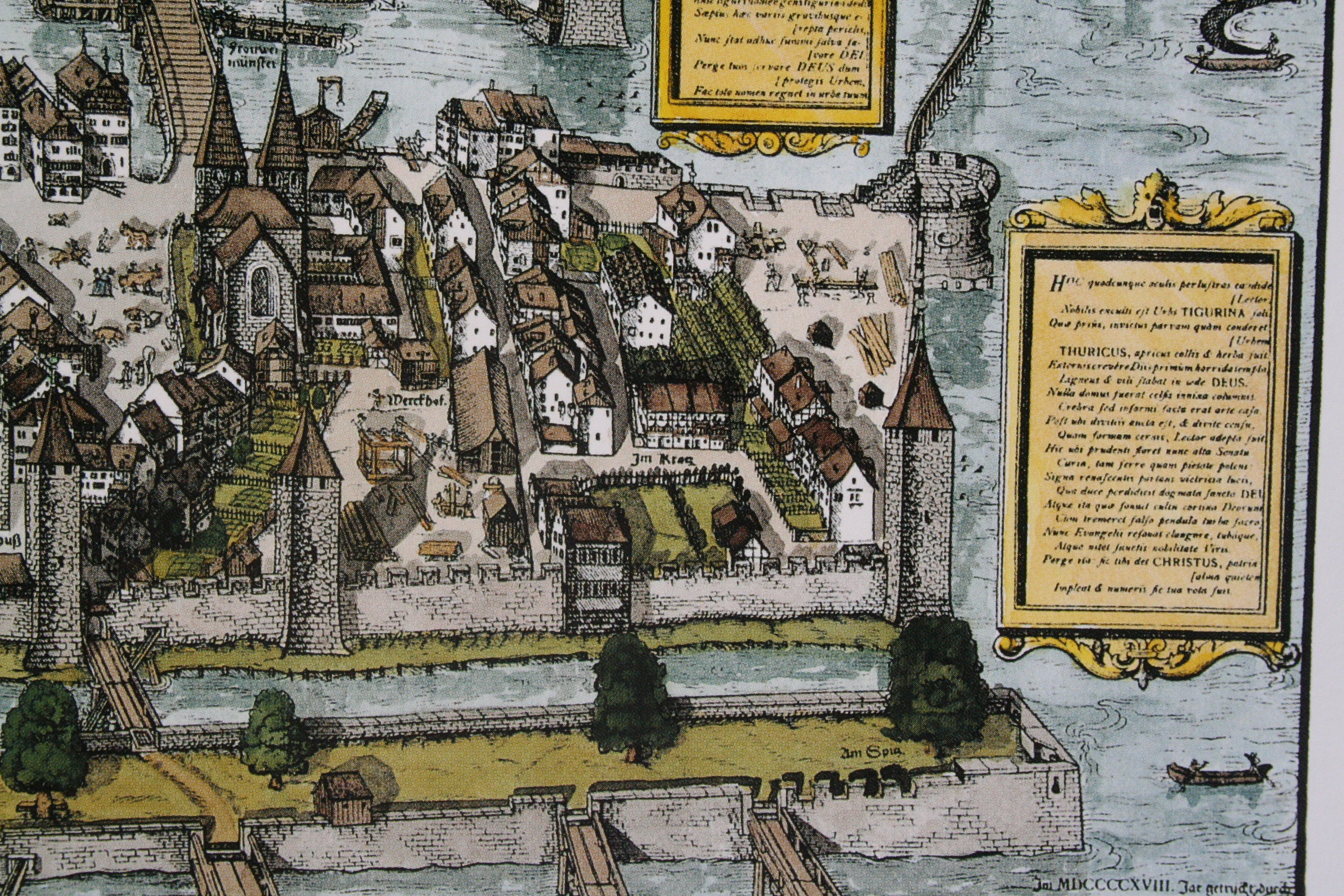 Kratzquartier in Zürich, im Vordergrund der Fröschen- und vorne der Sihlgraben. Vom links Wollishoferturm, Äbtissinnenturm, Kappelerhof und Kratzturm. Darstellung auf dem Murerplan von Jos Murer, 1576, koloriert von Thomas Germann